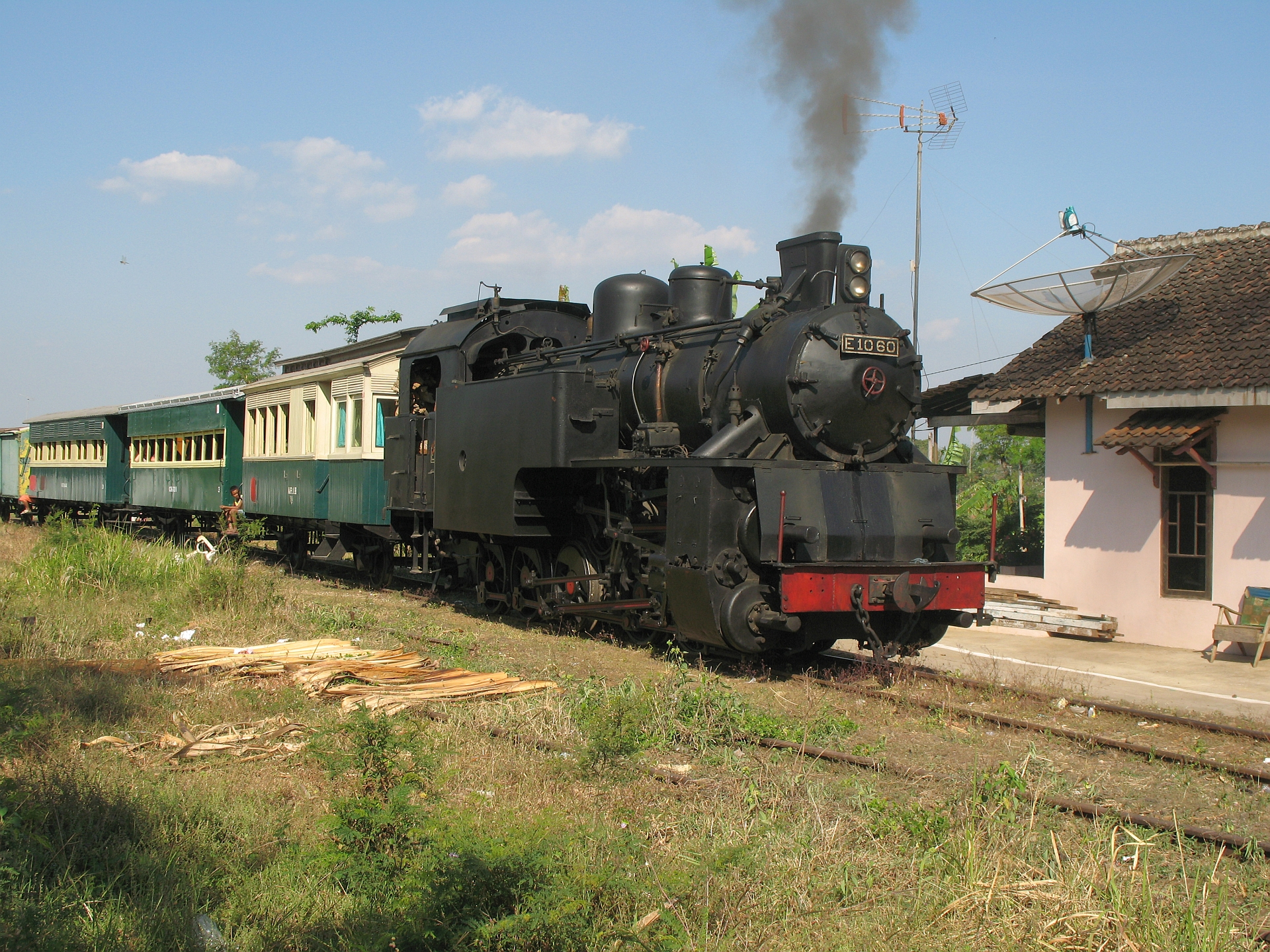 DKA E10 (E 10 60 F)